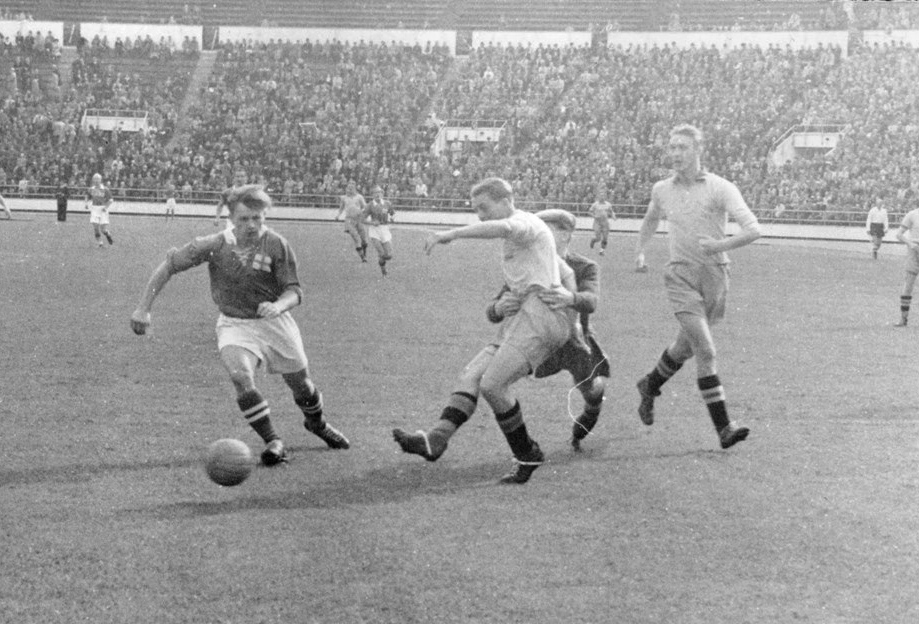 Landskamp mellan Finland och Sverige på Olympiastadion i Helsingfors.